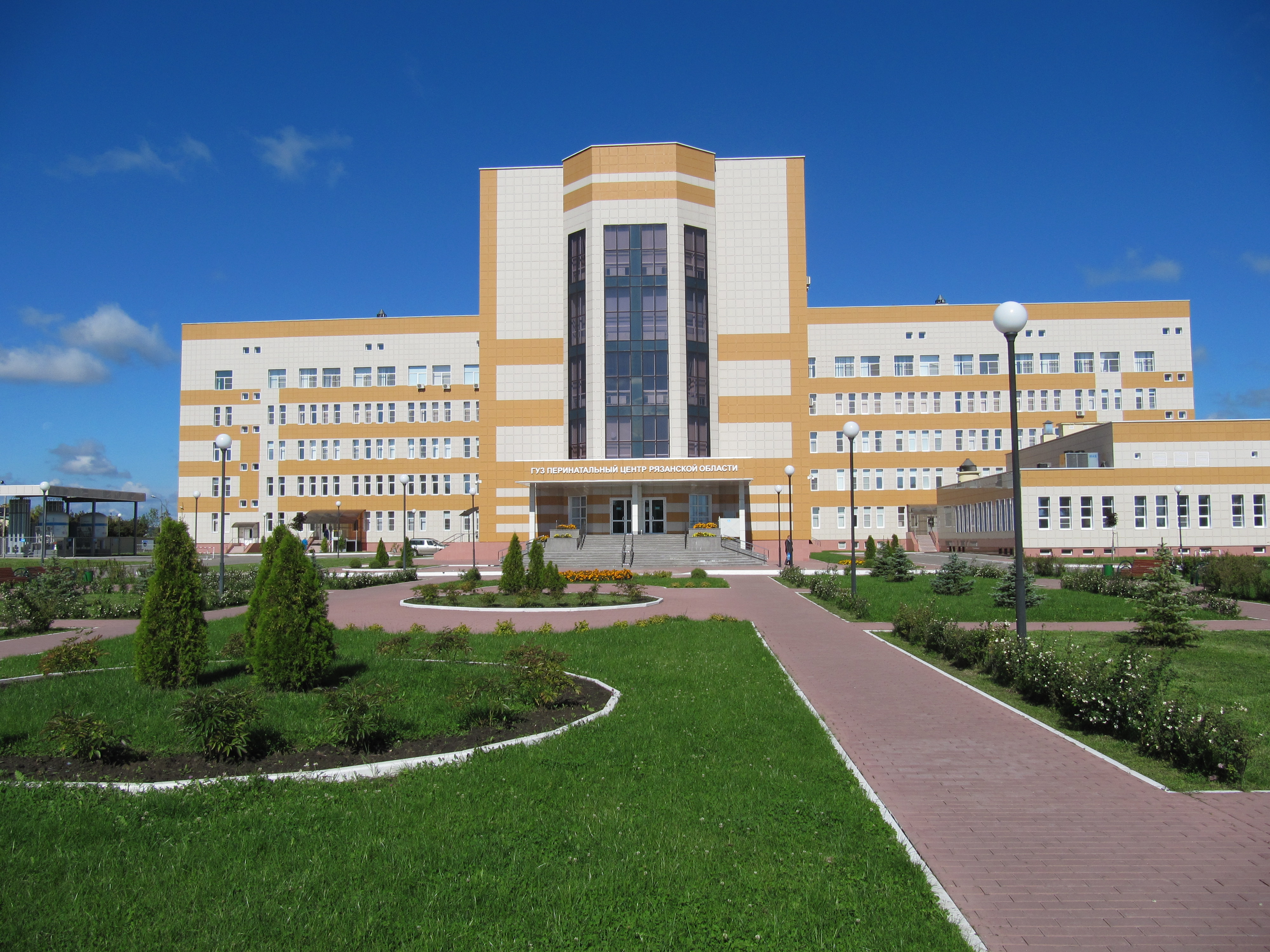 ГБУ РО ОКПЦ, Рязань, Интернациональная 1И